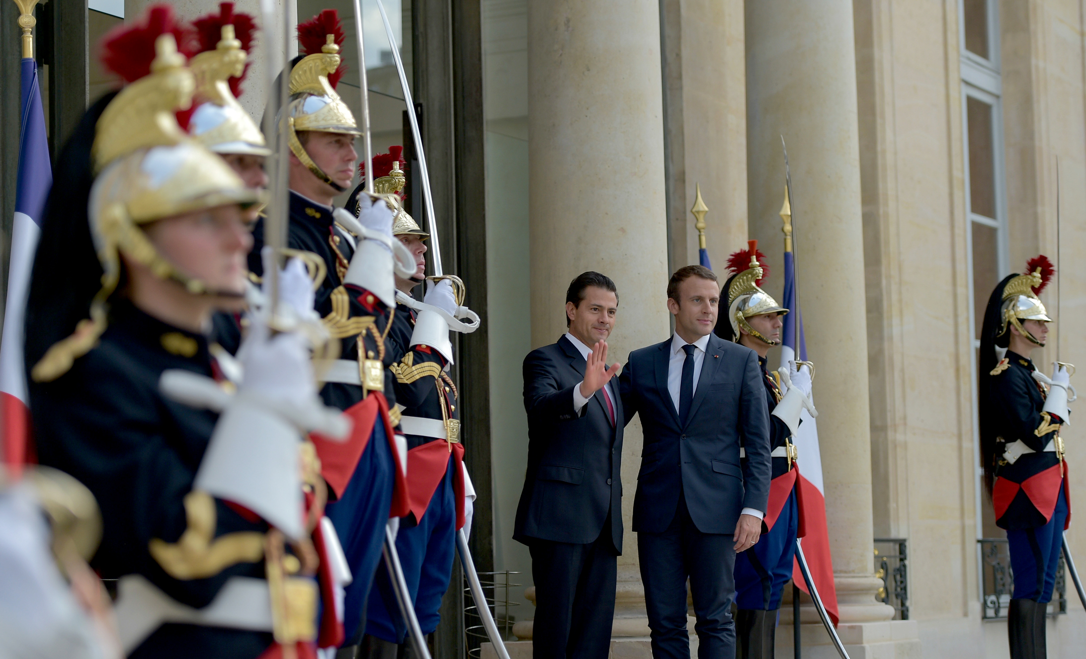 El Presidente Enrique Peña Nieto se encuentra en París, en donde se reunirá con el Presidente Emmanuel Macron, con el objetivo de fortalecer la relación entre México y Francia.